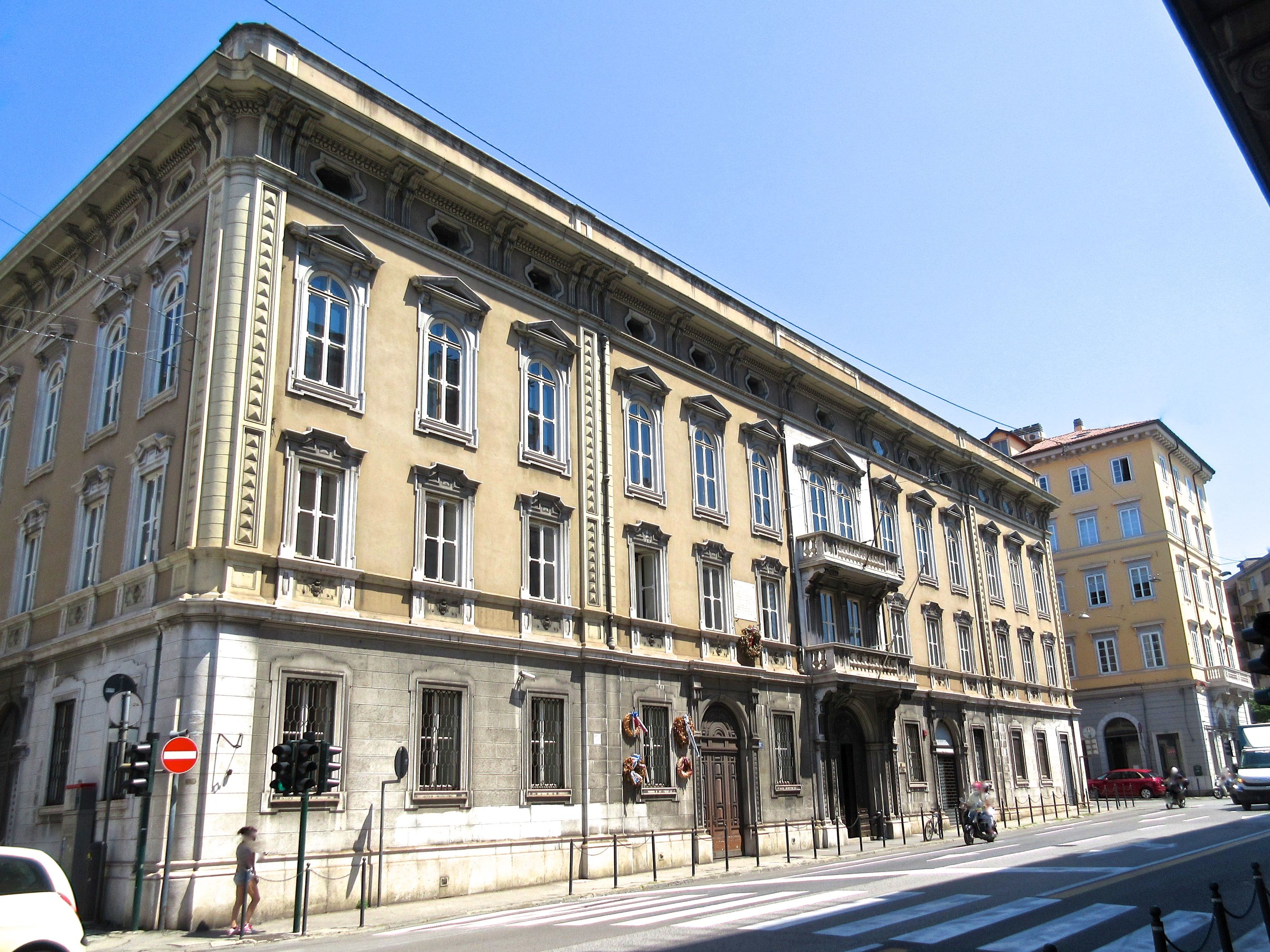 Italy - Trieste - Palazzo Rittmeyer - Via Carlo Ghega 12 - Sede del Conservatorio Giuseppe Tartini